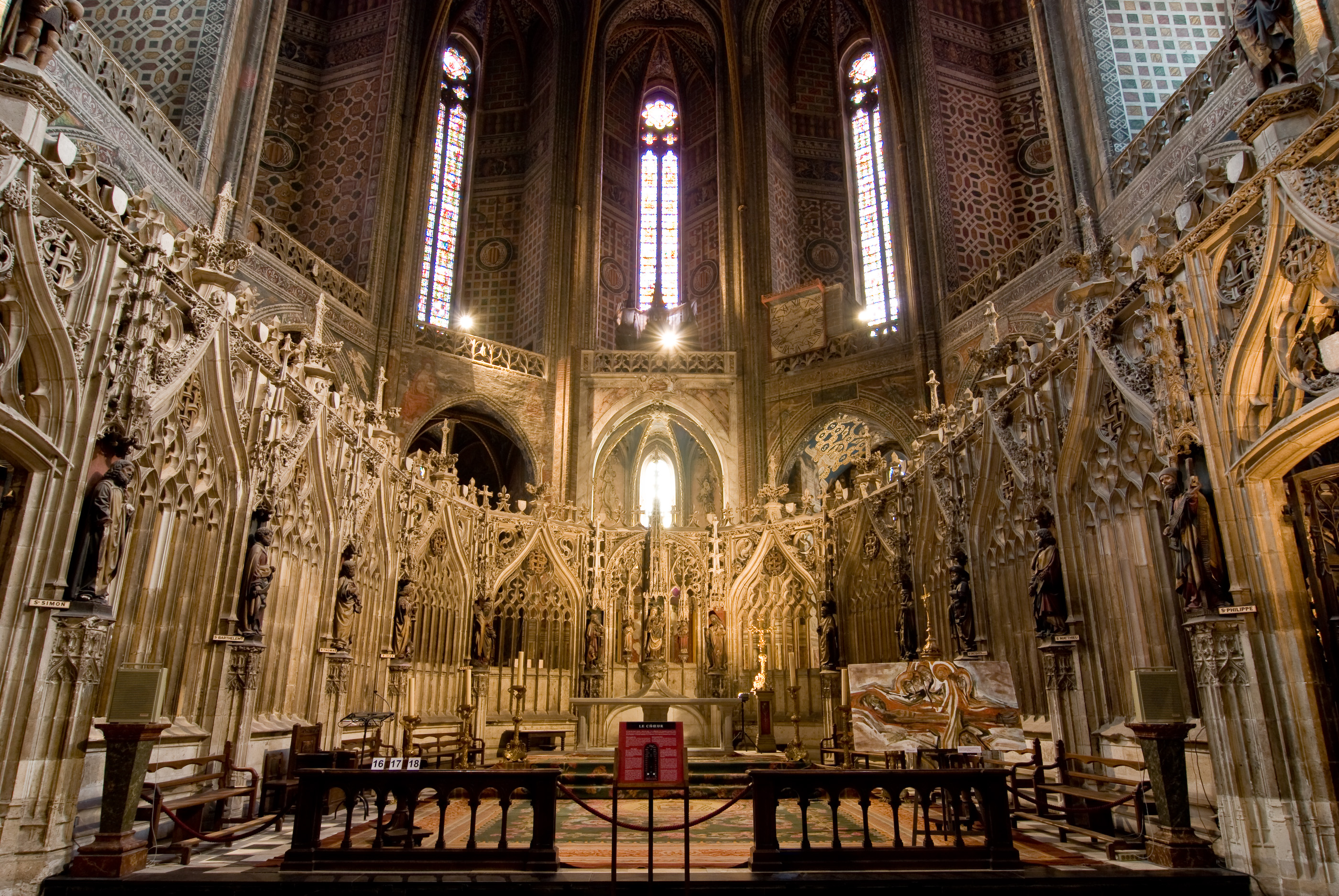 Abside et autel (Cathédrale Sainte-Cécile, Albi)